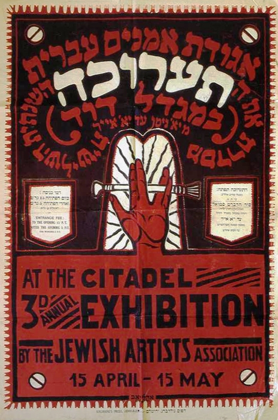 כרזה עבור התערוכה השלישית של אגודת אמנים עברית במגדל דוד. אפריל 1924. ליטוגרפיה. אמן לא ידוע.